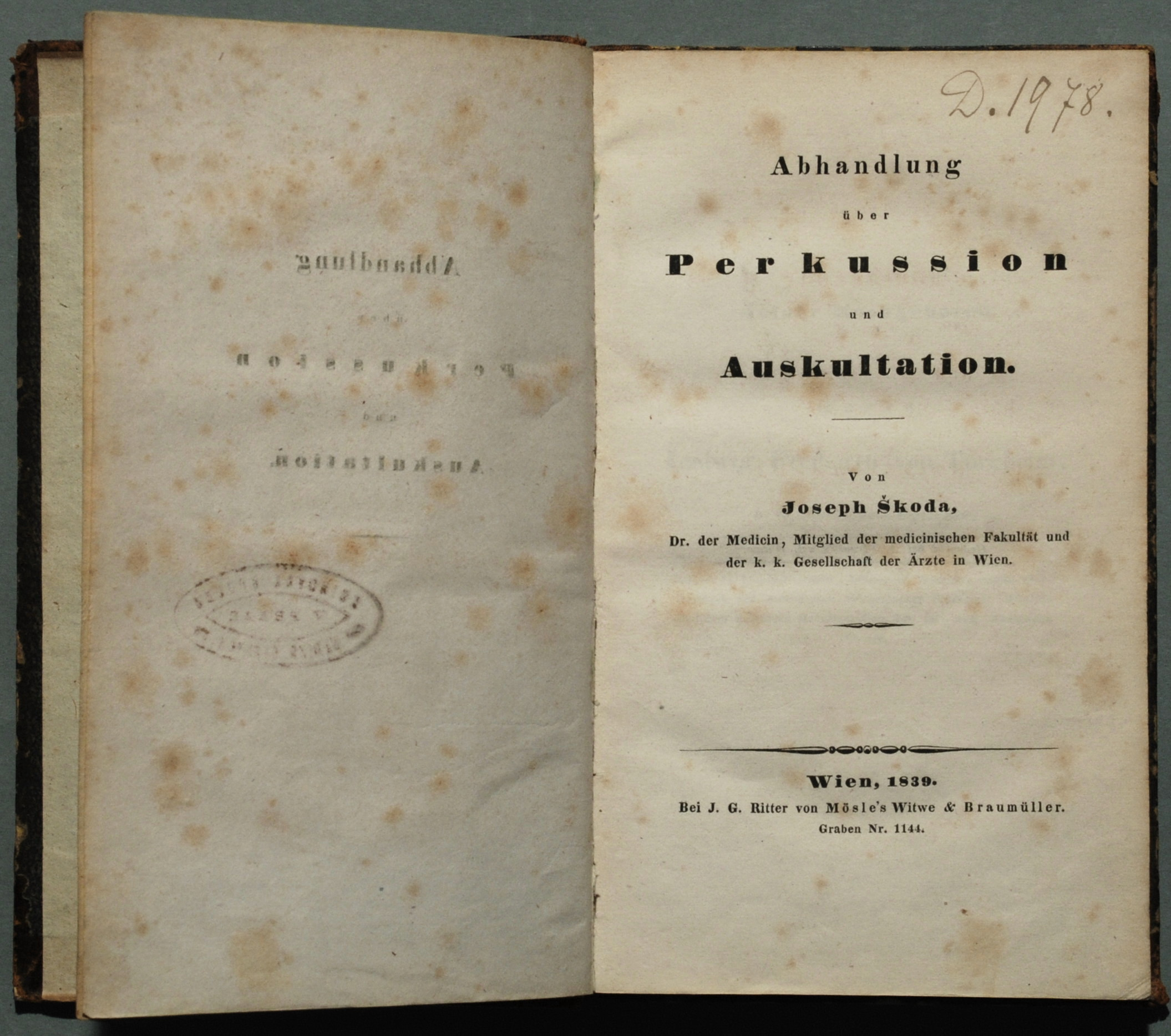 Skoda, Joseph: Abhandlung über Perkussion und Auskultation. Wien: Ritter & Braunmüller 1839, 272 Seiten